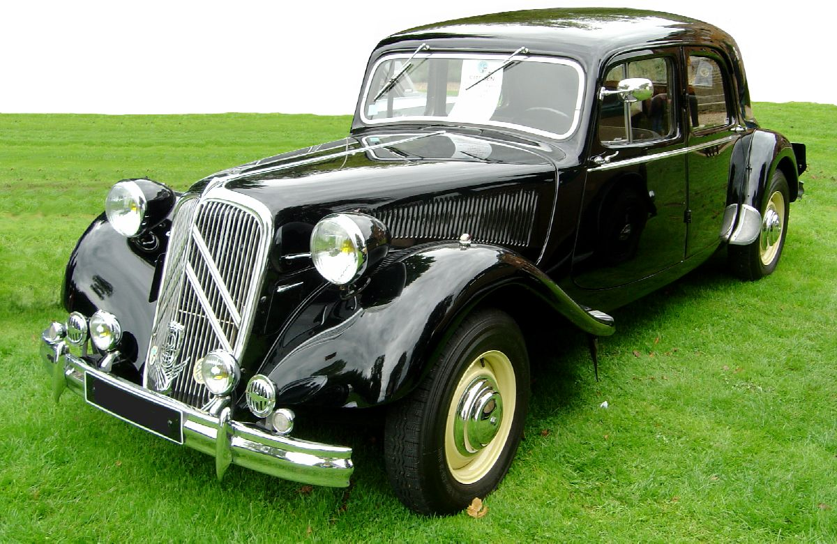 Citroën Traction Avant 15/Six - à partir d'une photo personnelle prise en 2004 - utilisateur:luna04